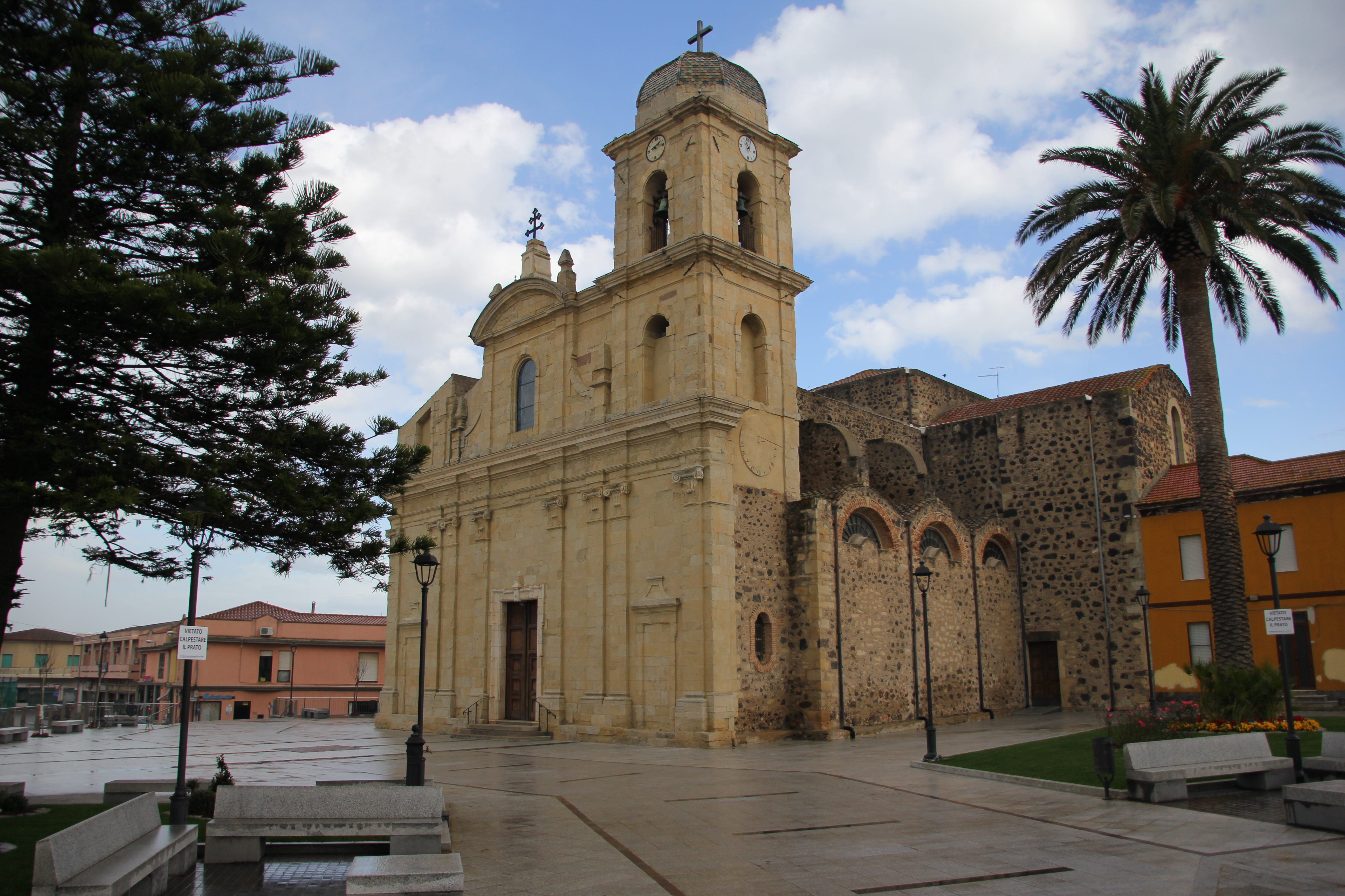 Terralba - Cattedrale di San Pietro